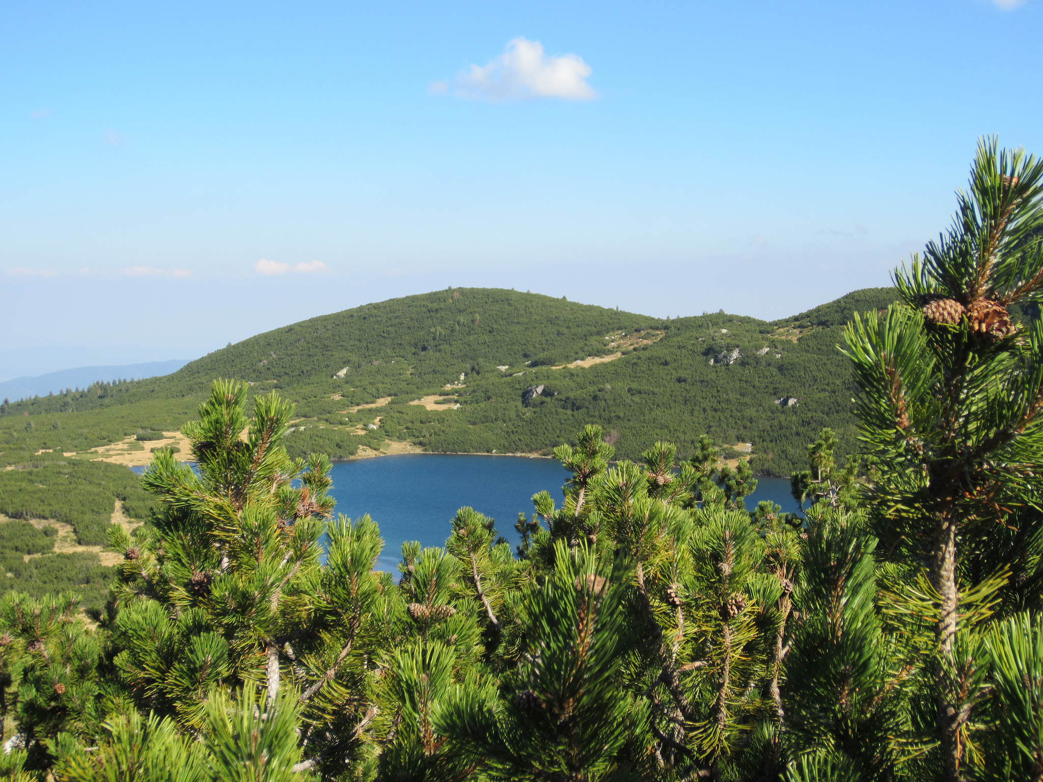 Mountain Pine Pinus mugo subsp. mugo, Sedemte Ezera, Rila Mts., Bulgaria.